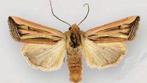 Hypotrix ferricola male